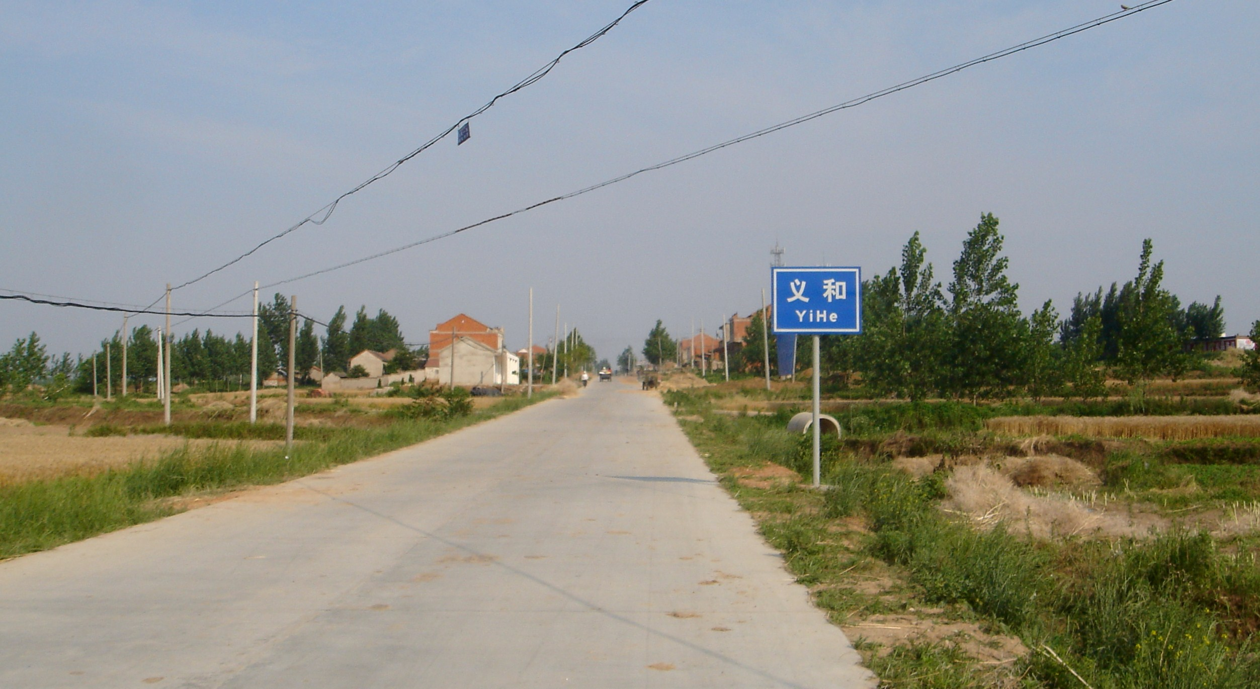 朱滁路，长丰县朱巷至滁州市的二级省义和段